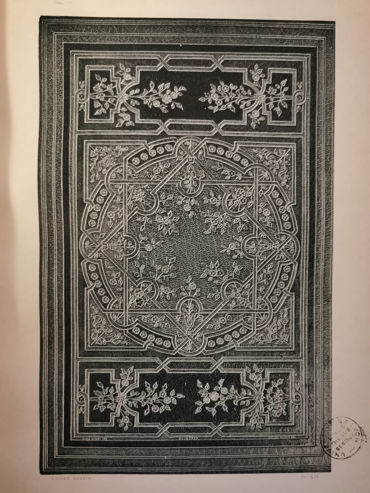 Maroquin bleu gris. Grande composition mosaïquée et dorée sur les plats et le dos. Encadrement de maroquin brun de même ton que les plates-bandes des deux compartiments extrêmes, haut et bas. Compartiment central : entrelacs gris rosé avec fond citron, petites feuilles, fleurs et rosettes mosaïquées de teintes multicolores ; toute la mosaïque sertie d'or. Dos orné en rapport des plats - Large dentelle intérieure aux filets droits formant compartiments, et petits fers encadrant les doublures. Doublures et gardes de soie ancienne brochée et lamée. - 1888. Exposition universelle de Paris, 1889. Exposition universelle de Lyon, 1894. M. L. Bardey, à Lyon